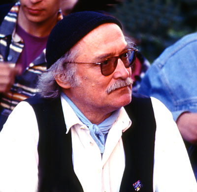 Hans W. Geißendörfer, fotografiert 1997 während des Volksfestes zur 600. Lindenstraße-Folge auf dem Produktionsgelände in Köln-Bocklemünd.